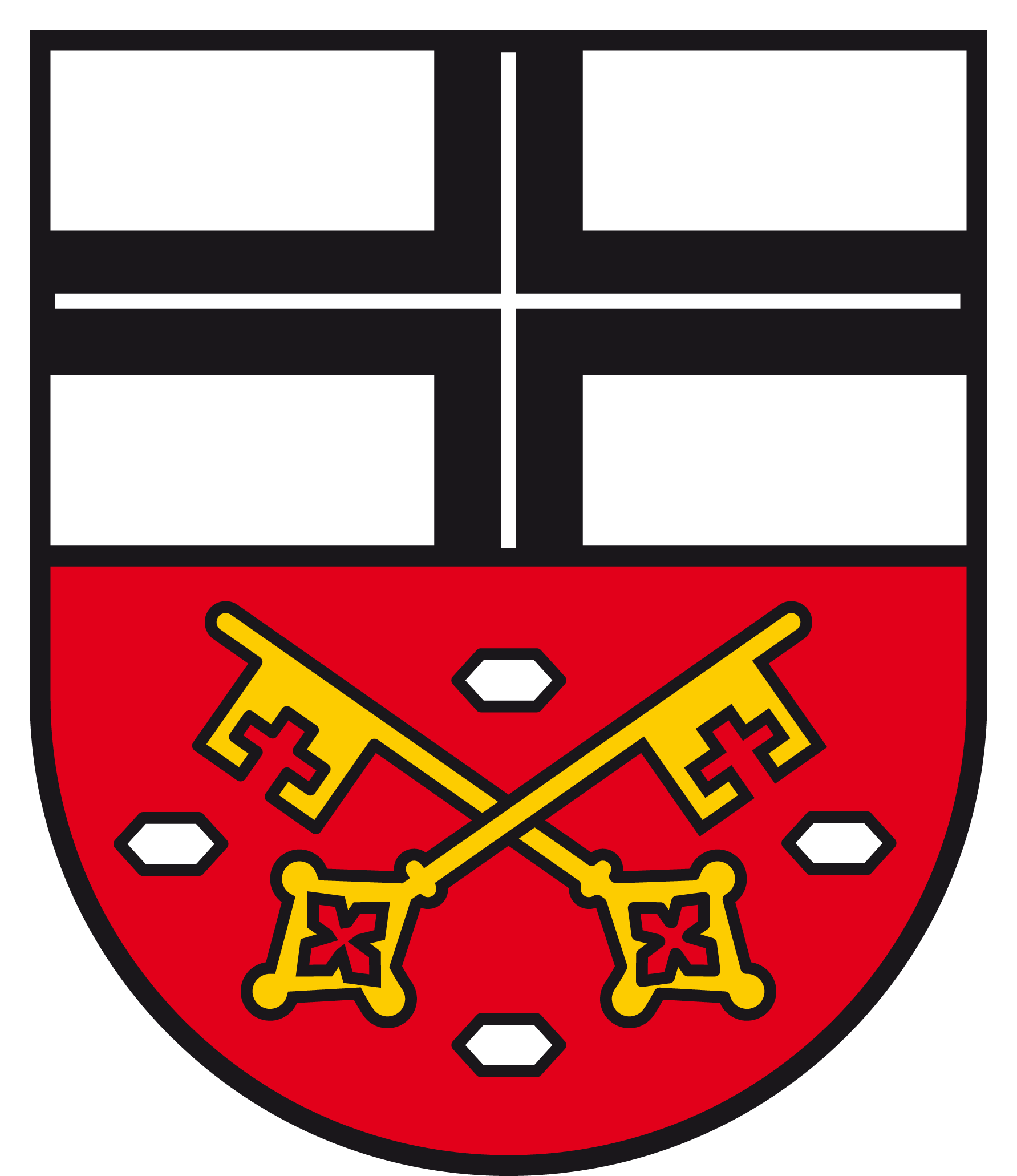 Stadtwappen Unkel